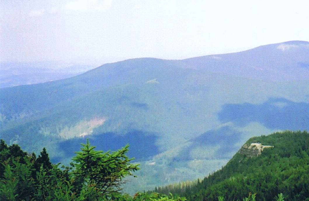 Cyl Hali Śmietanowej (on the left) and Polica (on the right). View from the slope of Kępa. Cyl Hali Śmietanowej (po lewej) i Polica (po prawej). Widok ze stoku Kępy.